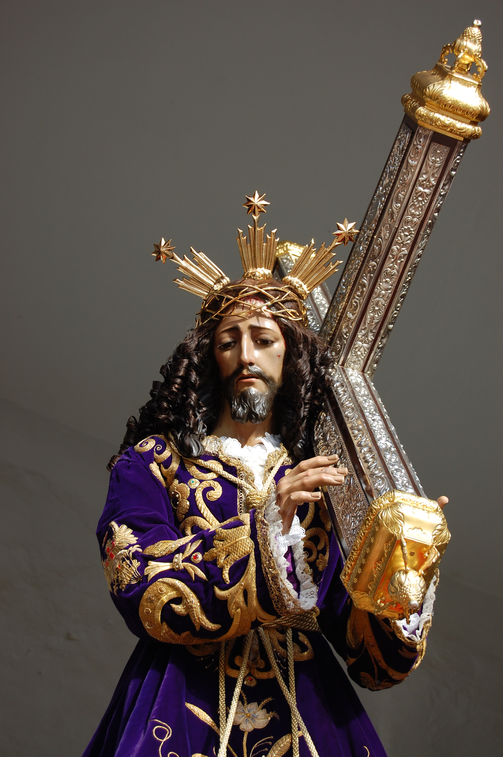 salida del jueves santo 2009